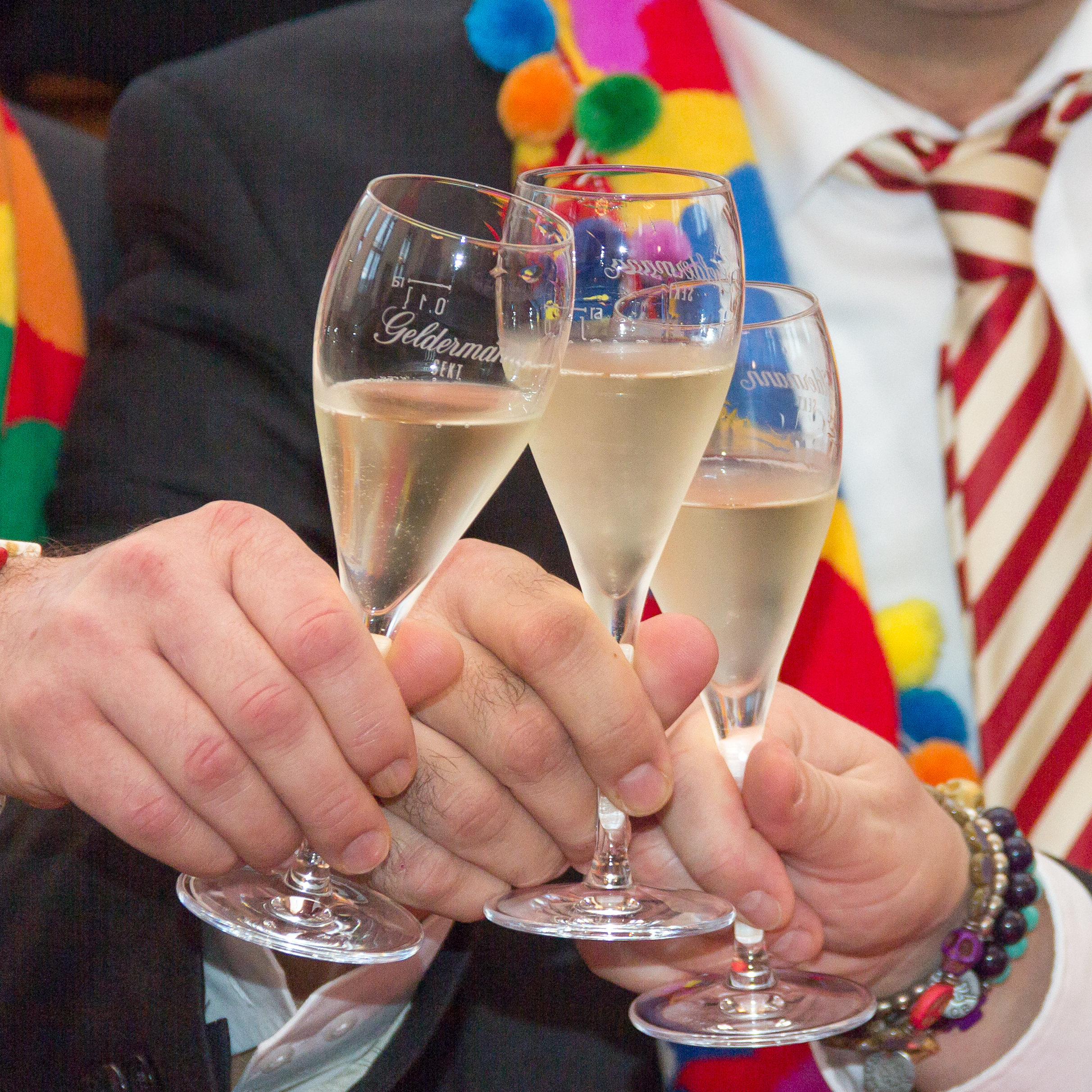 Kölner Dreigestirn von der Prinzen-Garde Köln 1906 e.V. Vertragsunterzeichnung des Sessionsvertrages im Senatssaal und Empfang durch die Oberbürgermeisterin, vertreten durch die Bürgermeisterin Elfi Scho-Anttwerpes, im Hansasaal des Historischen Rathauses von Köln Foto: Das Dreigestirn stößt mit Sektgläsern an.